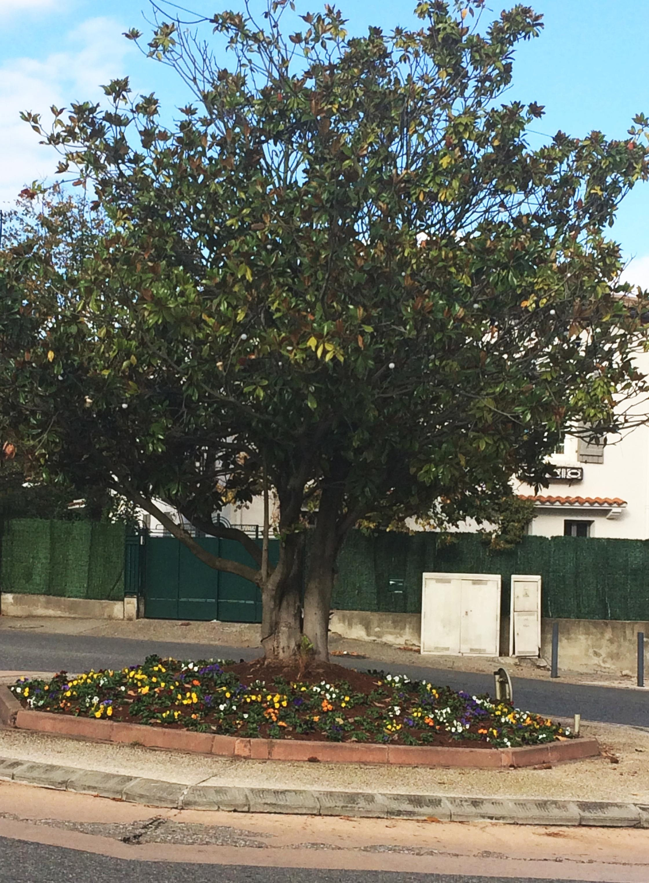 Blagnac (Haute-Garonne, France) - Le magnolia de la Place Plan du Port, planté au milieu des années 2000.